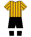 Tottenham-mez